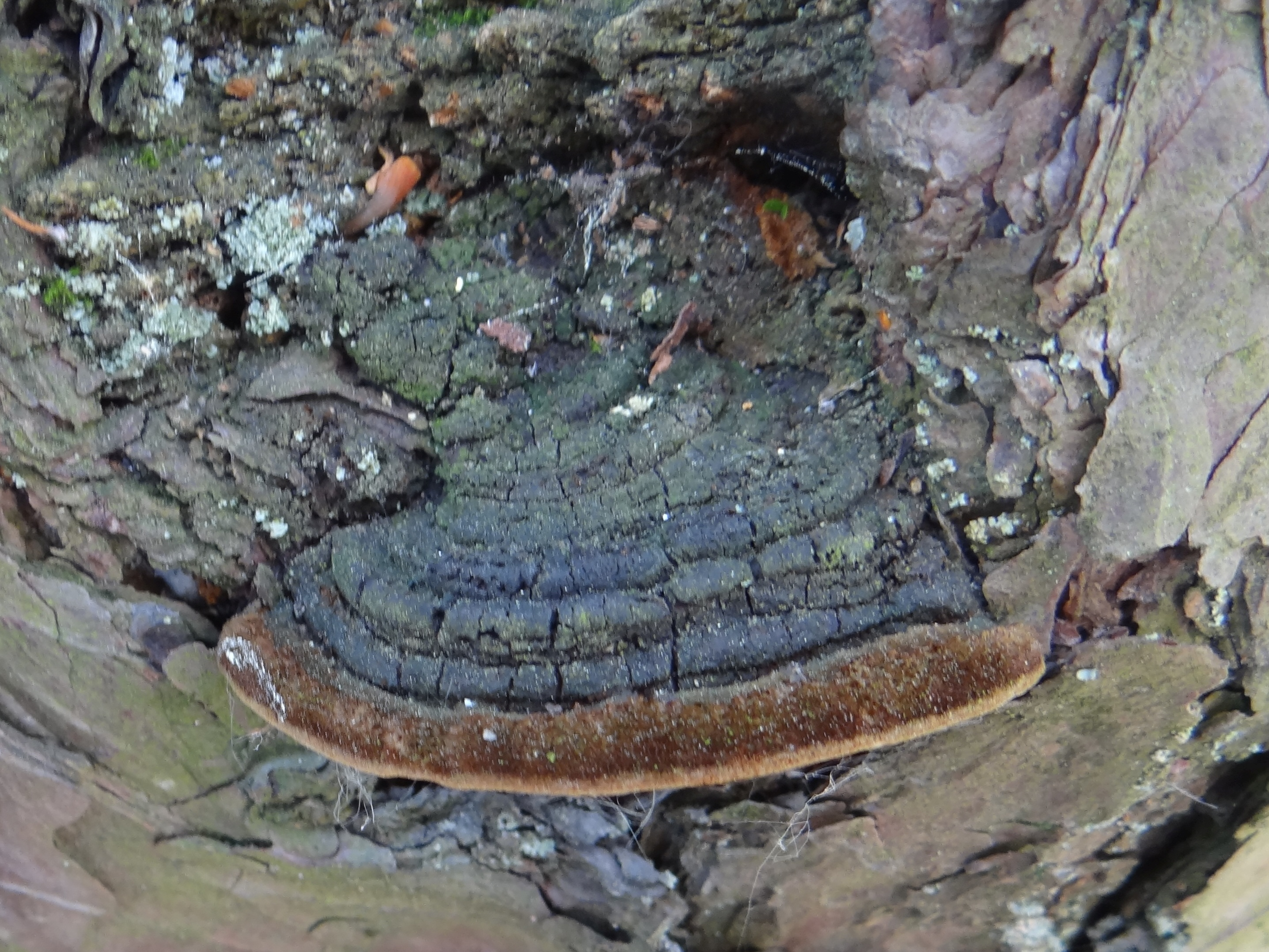 Porodaedalea pini. Location: Poland, Pogórze Ciężkowickie, las mieszany przy skale Borówka w miejscowości Żurowa